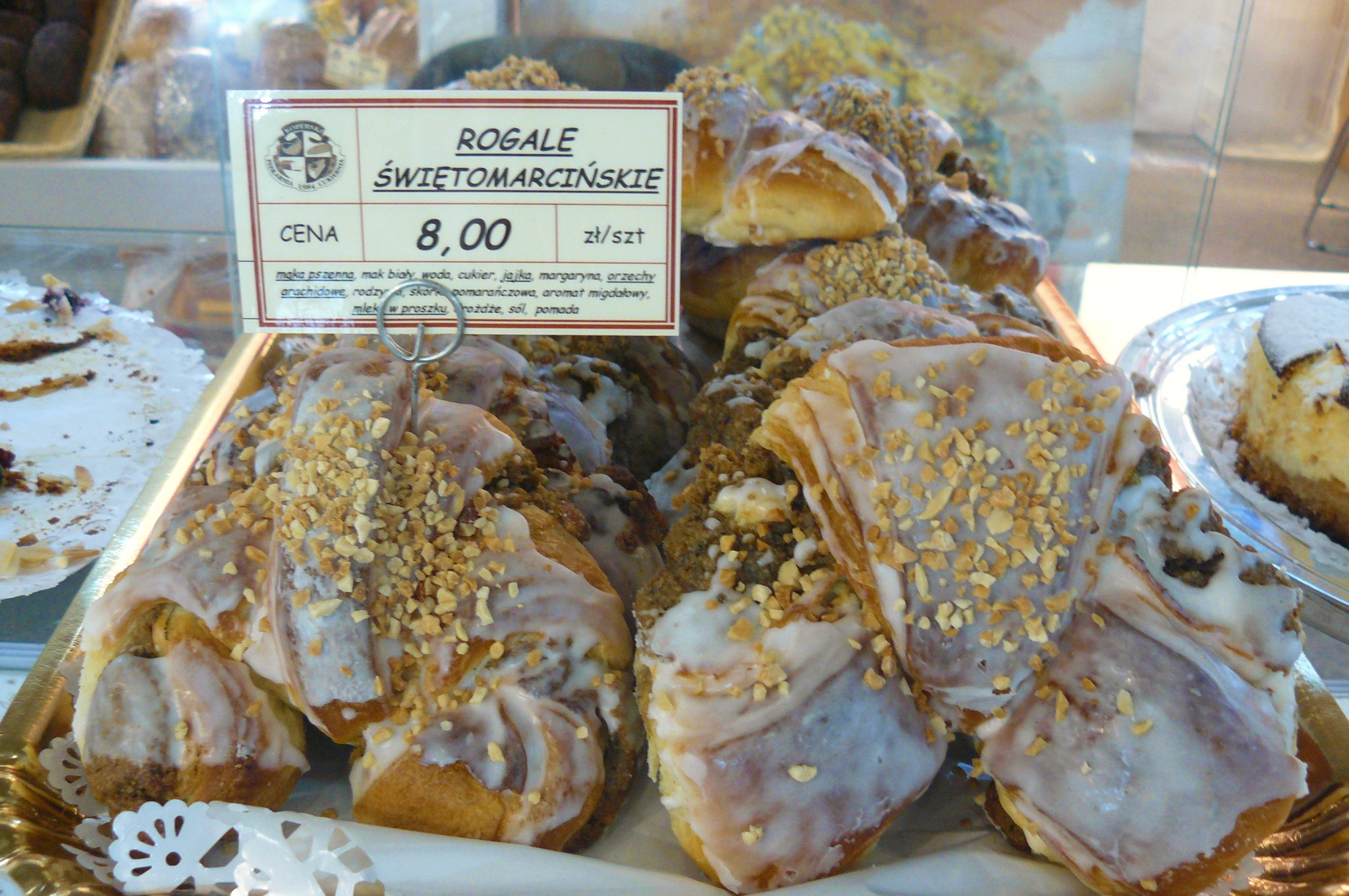 Rogale świętomarcińskie na Smakach Regionów, Poznań, 2015r.